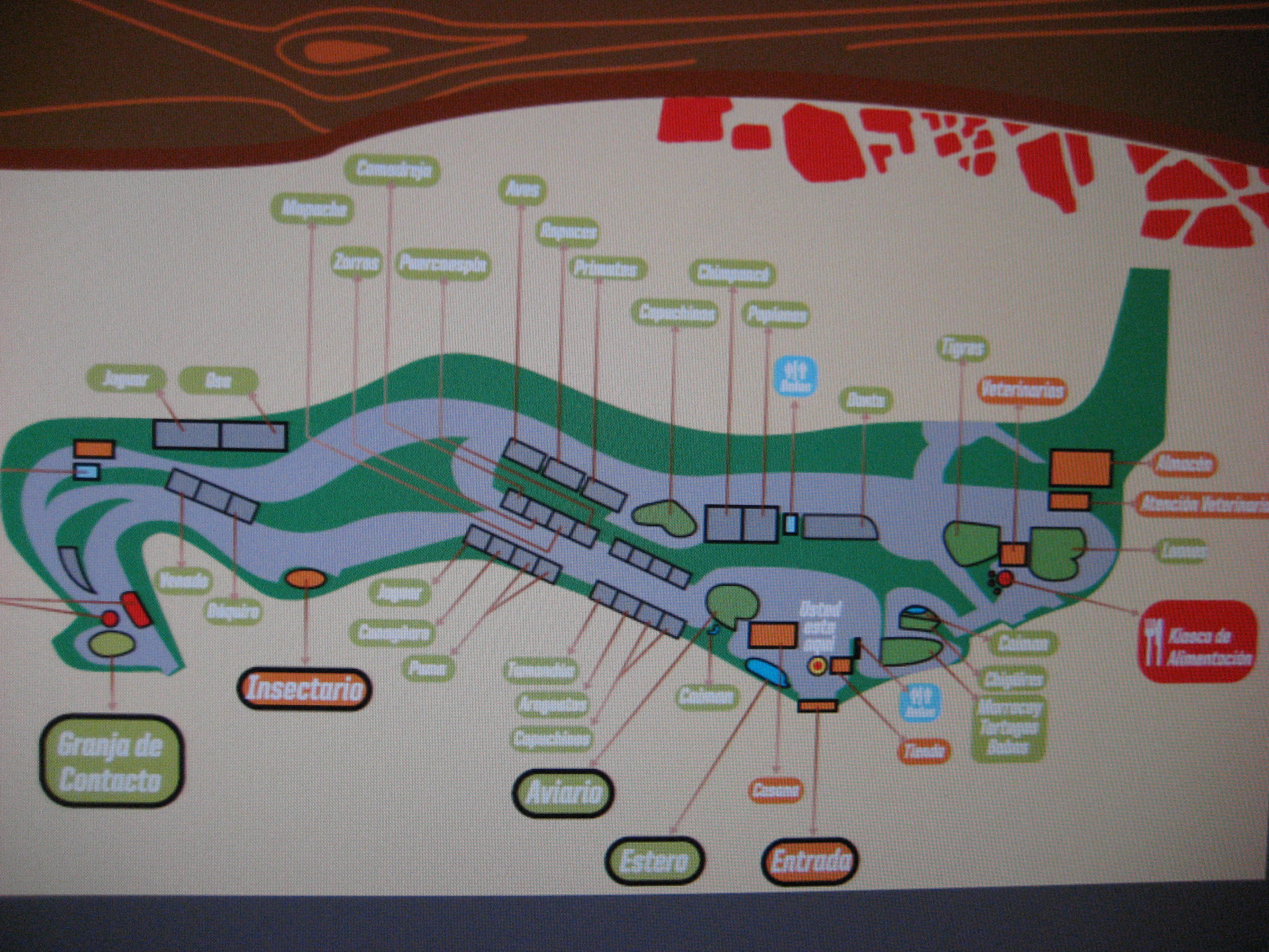 Mapa oficial del Zoológico el Pinar, Caracas.